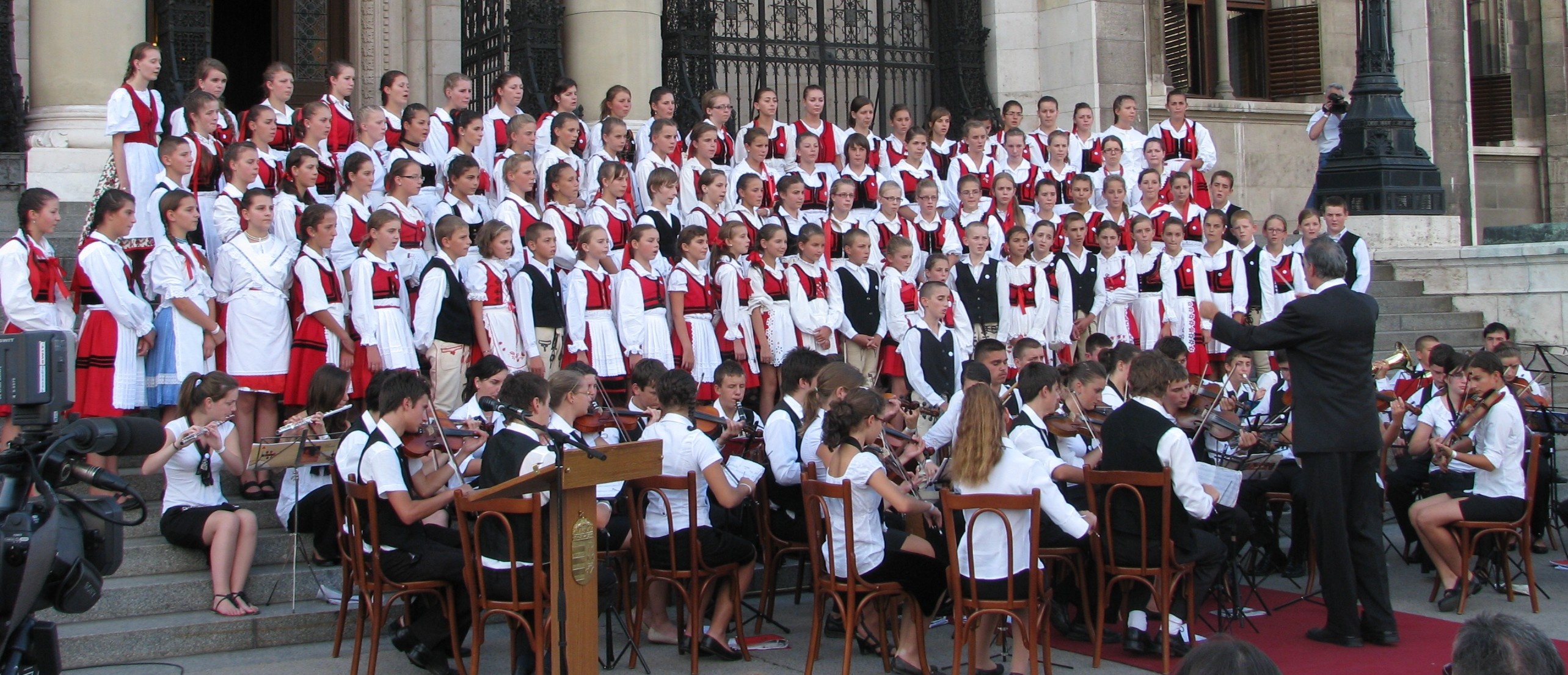 Szentegyházi Gyermekfilharmónia Budapesten